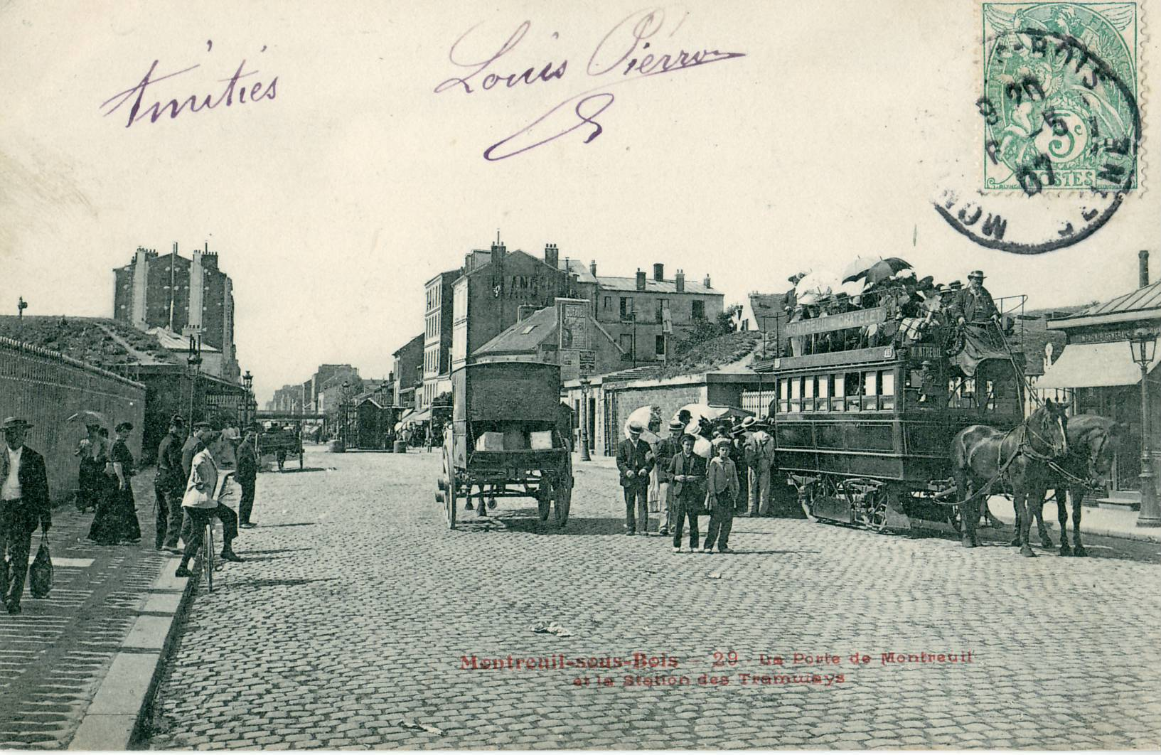 carte postale ancienne éditée par F. Fleury N°29Montreuil (Seine-Saint-Denis) - La porte de Montreuil et la station de tramwaysIl s'agit en fait d'une station d'omnibus, le véhicule n'étant pas guidé par des rails. Il desservait la ligne Montreuil - Place du Châtelet